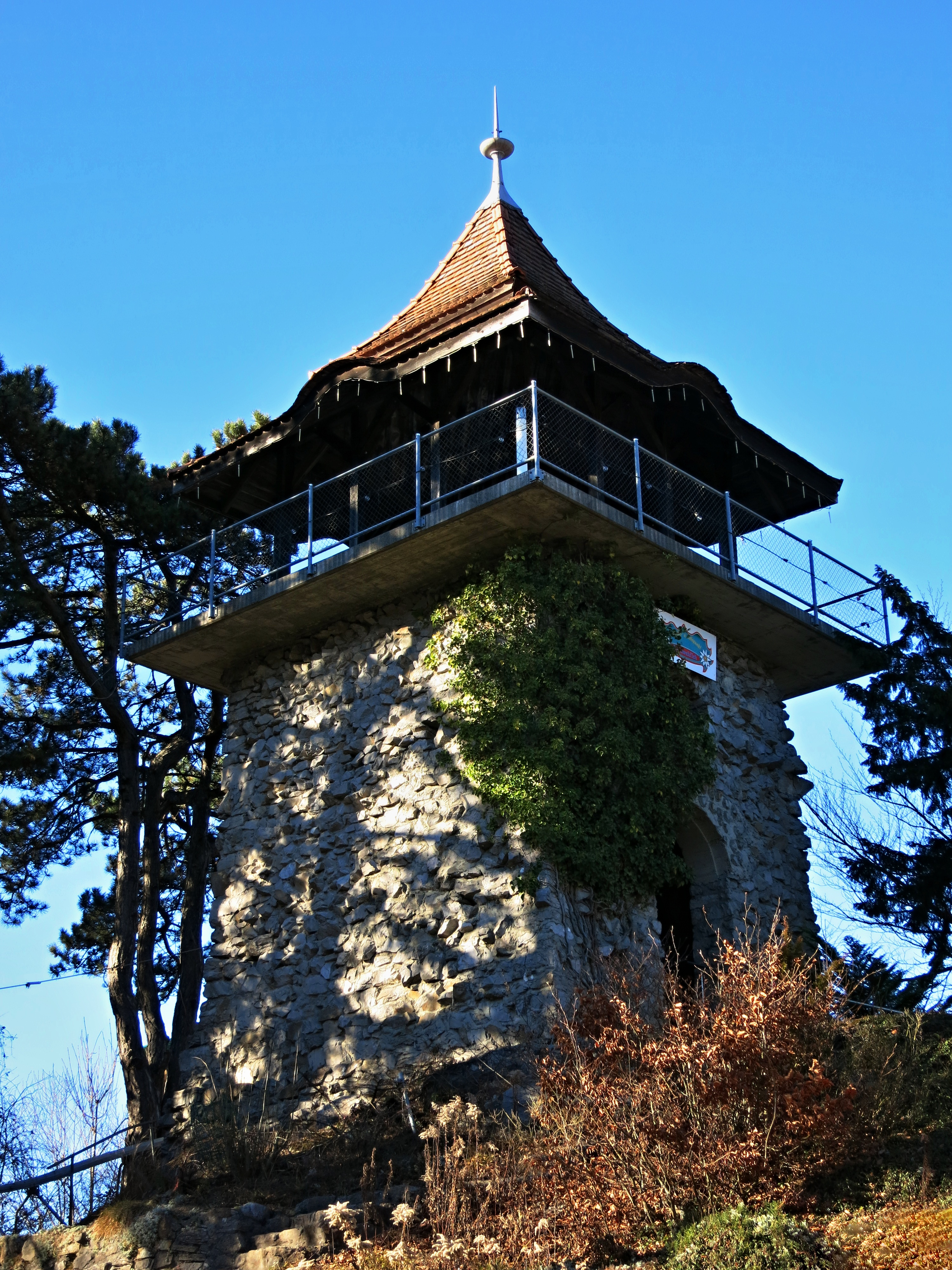 Heimwehfluhturm